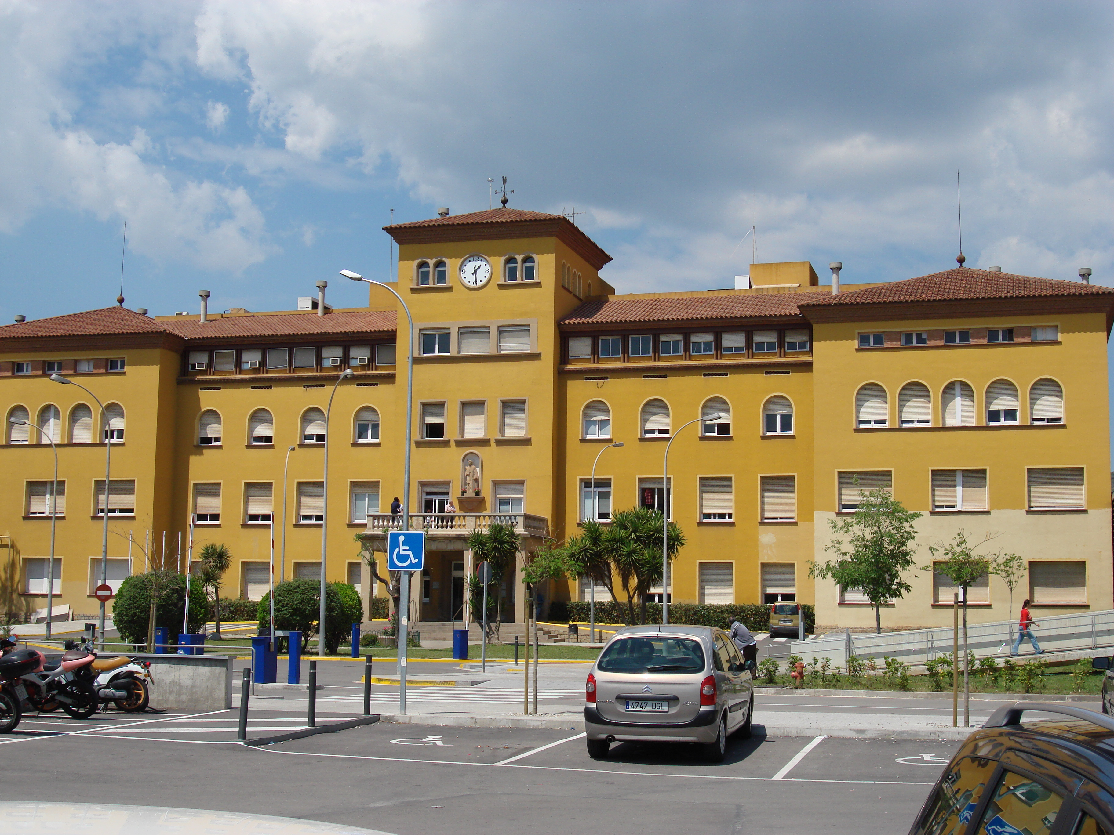 Hospital de Sant Llorenç a Viladecans, construit per la Fàbrica Roca i ara Hospital públic de Viladecans.